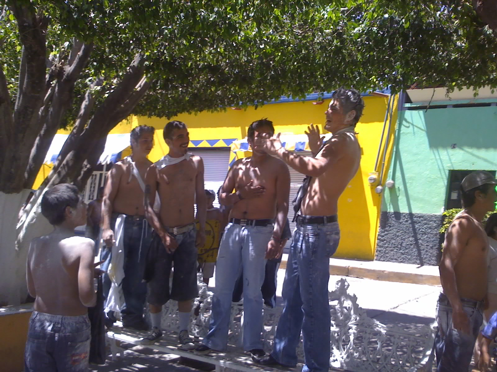 Al final de la quema de Judas del 2008